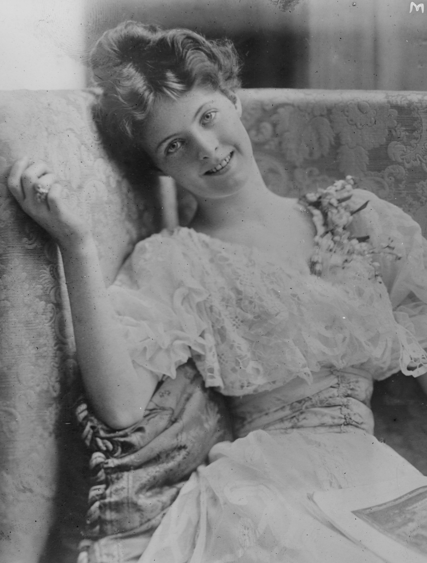 Actress Mabel Taliaferro